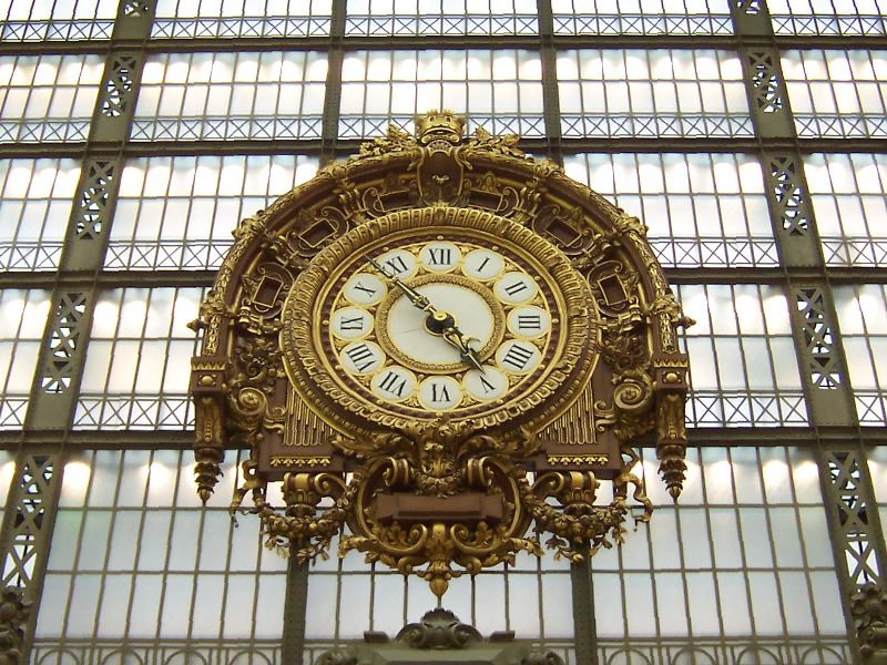 Station Clock in Musée d'Orsay